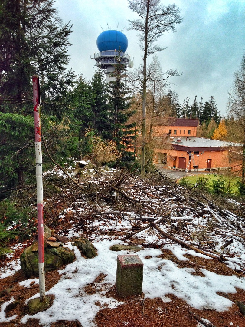 Vrchol brdského Písku, v pozadí radar řízení letového provozu